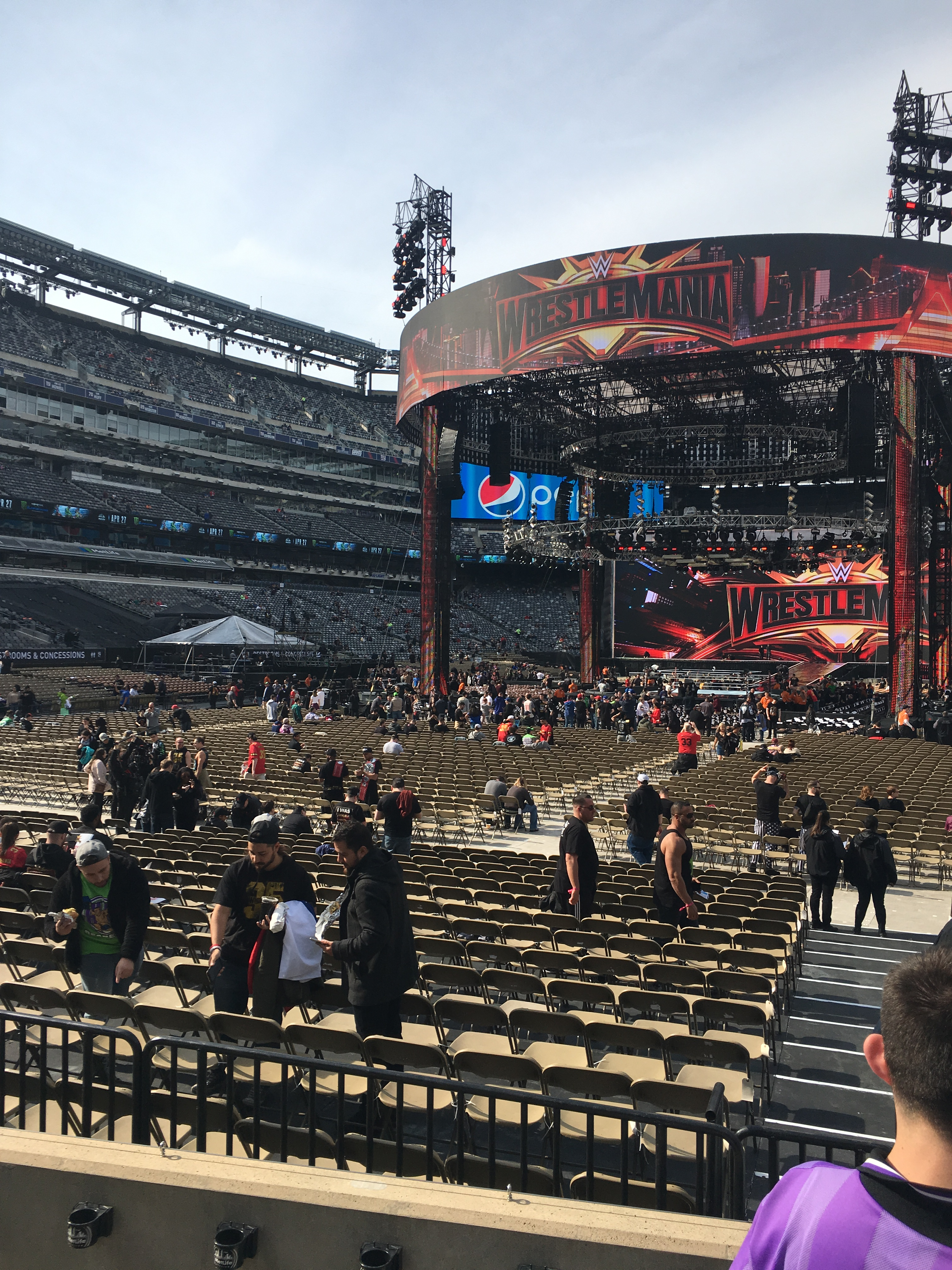 foto fatta dal vivo da me prima che partisse il kick off dello show